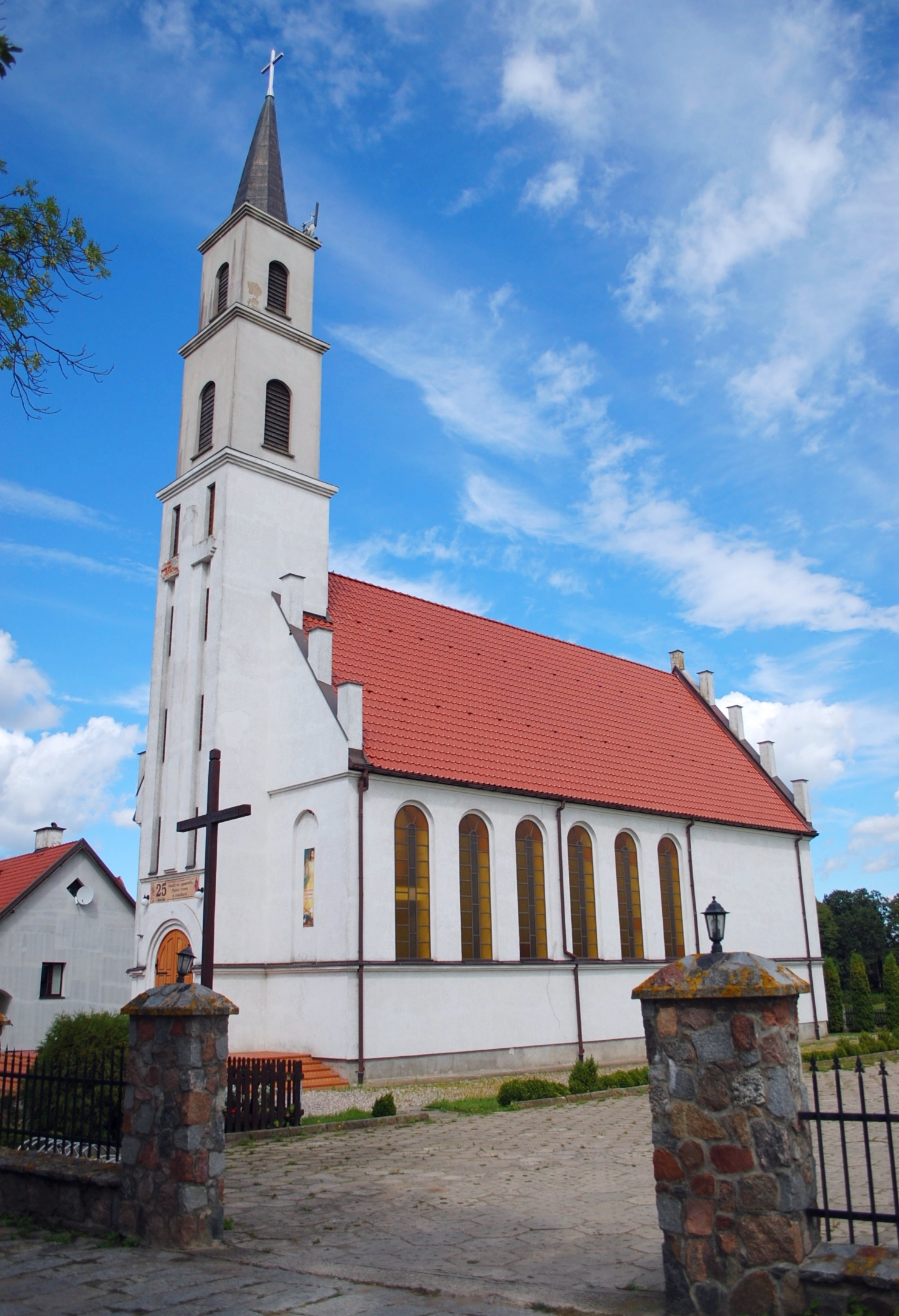 Judziki - rzymskokatolicki kościół parafialny p.w. Apostołów Piotra i Pawła